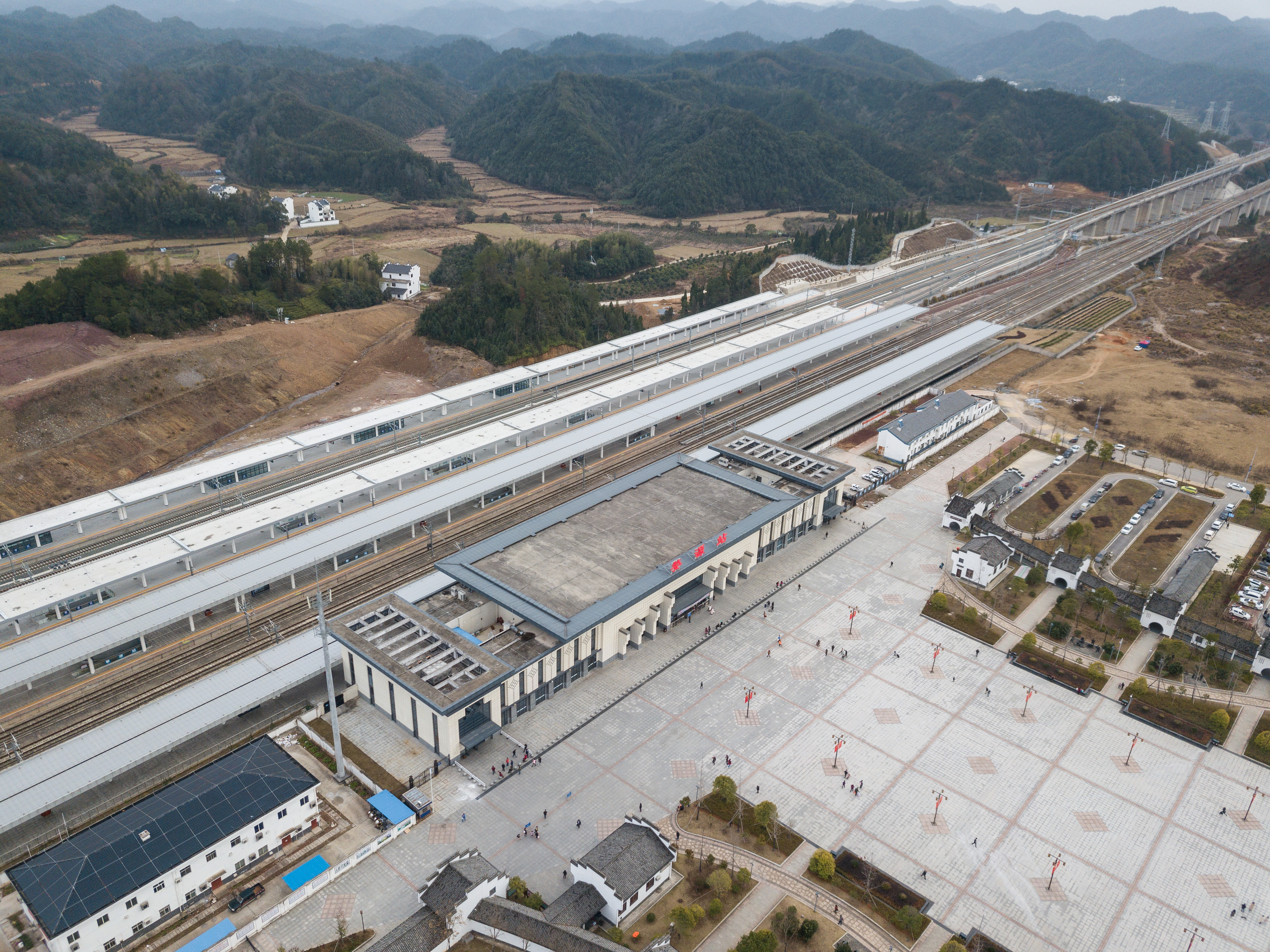 婺源站